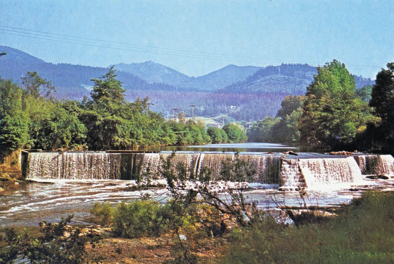 Presa arkuduna. Bedia